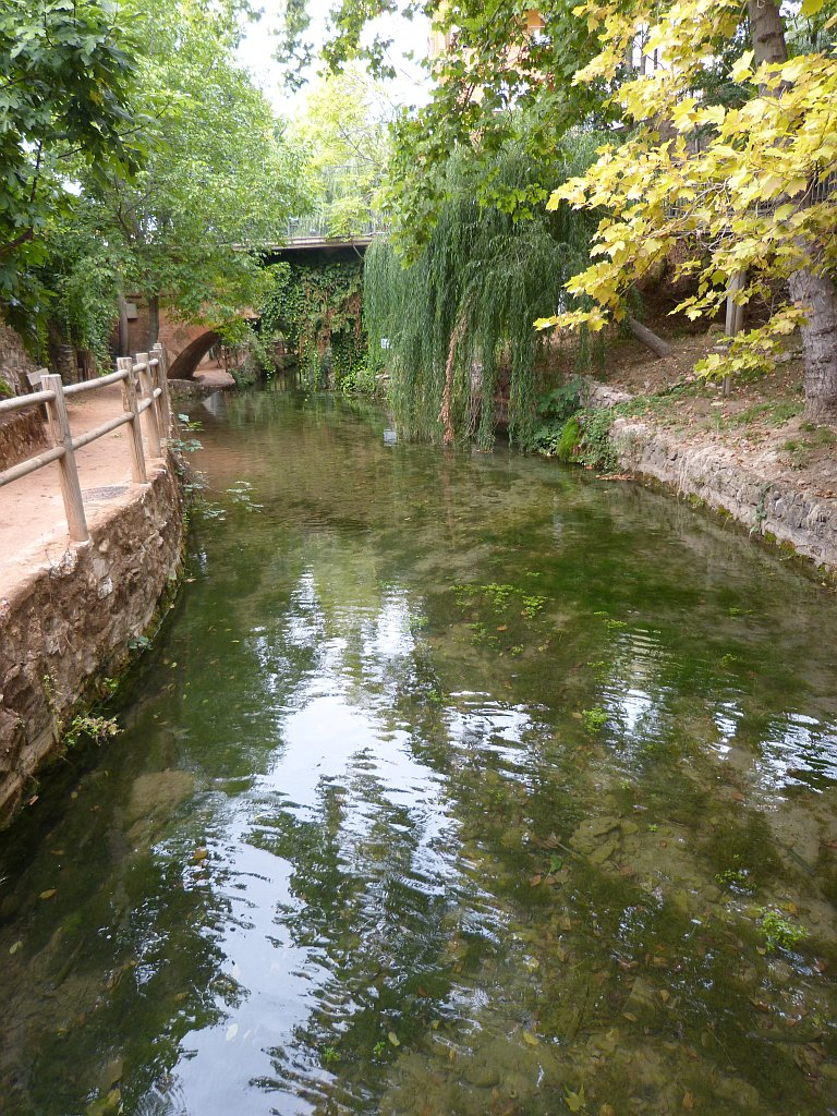 río de Salobre